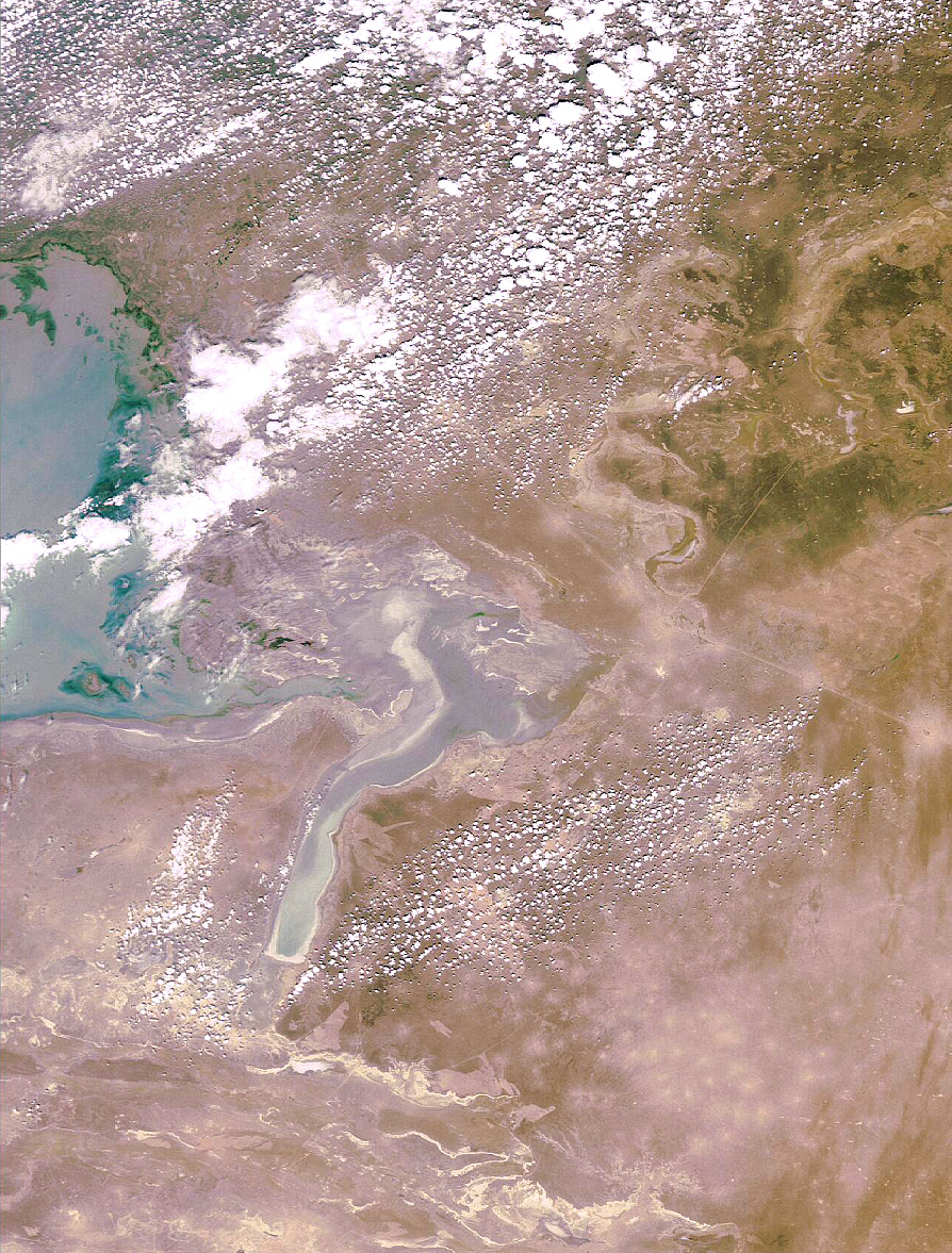 Kaydak gulf